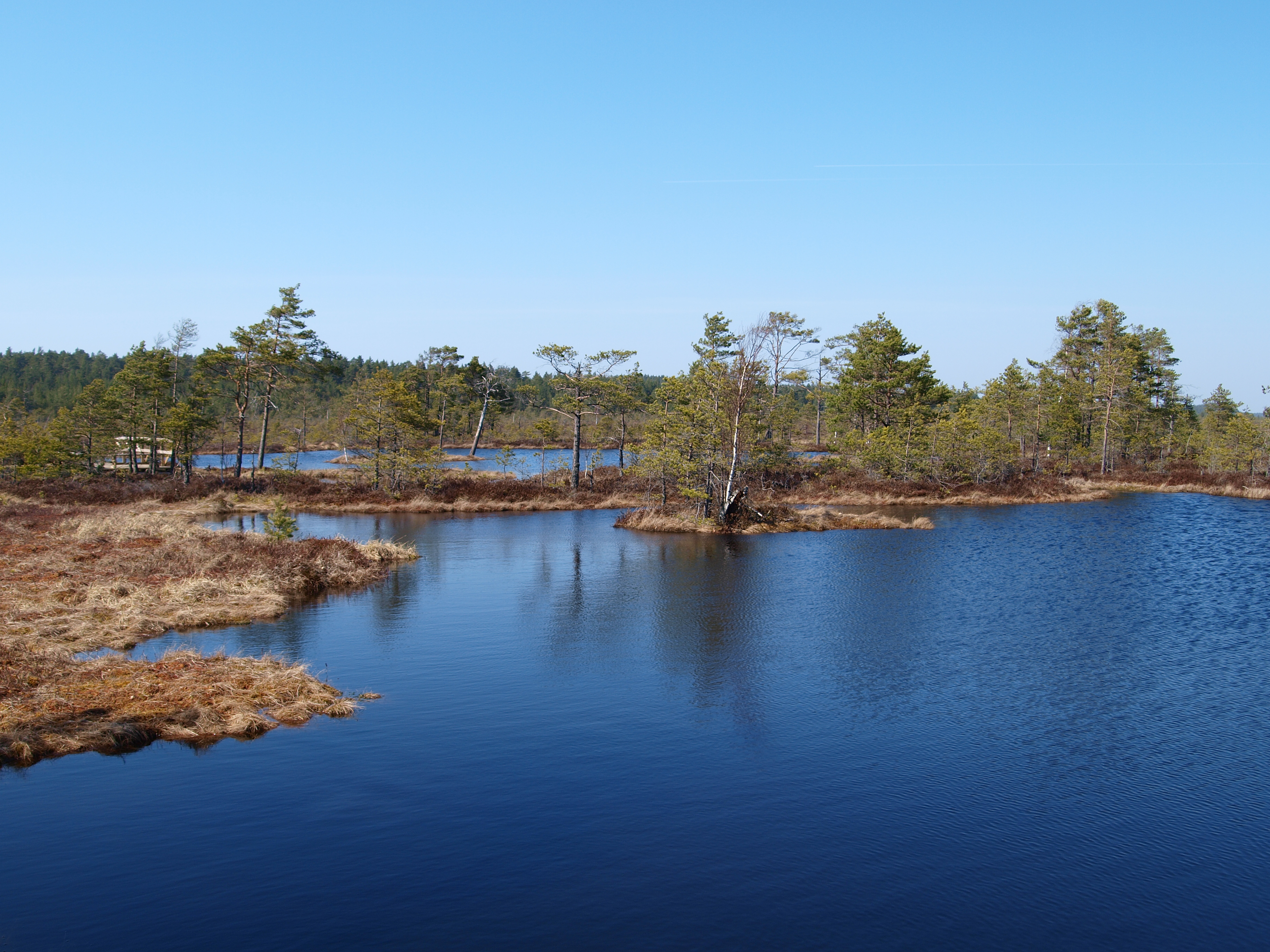 Tolkuse raba laukad